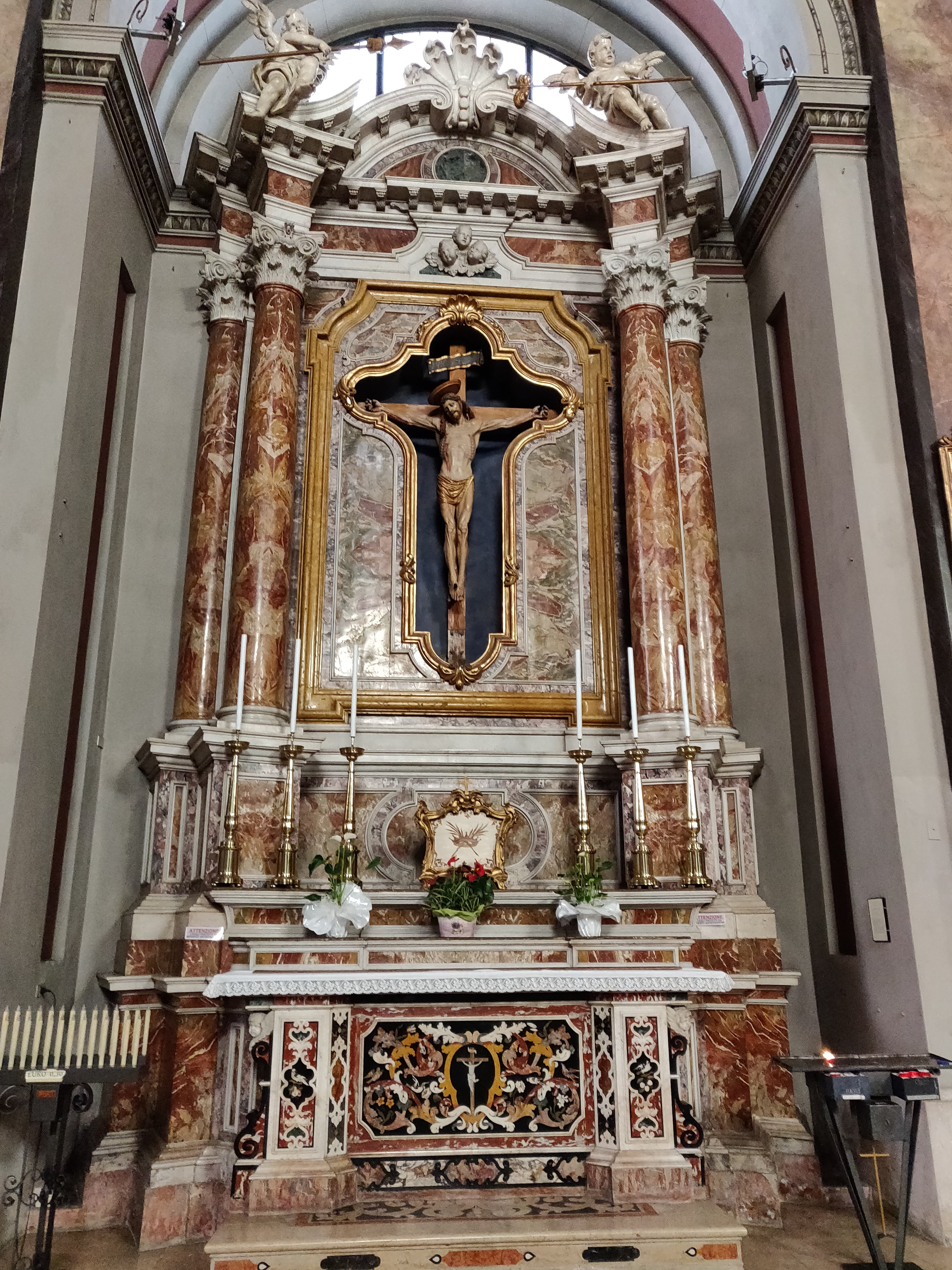 Uno dei sei altari della parrocchiale seicentesca